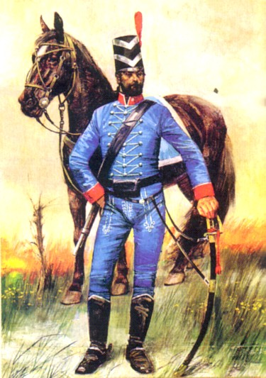 1806husaresdelrey